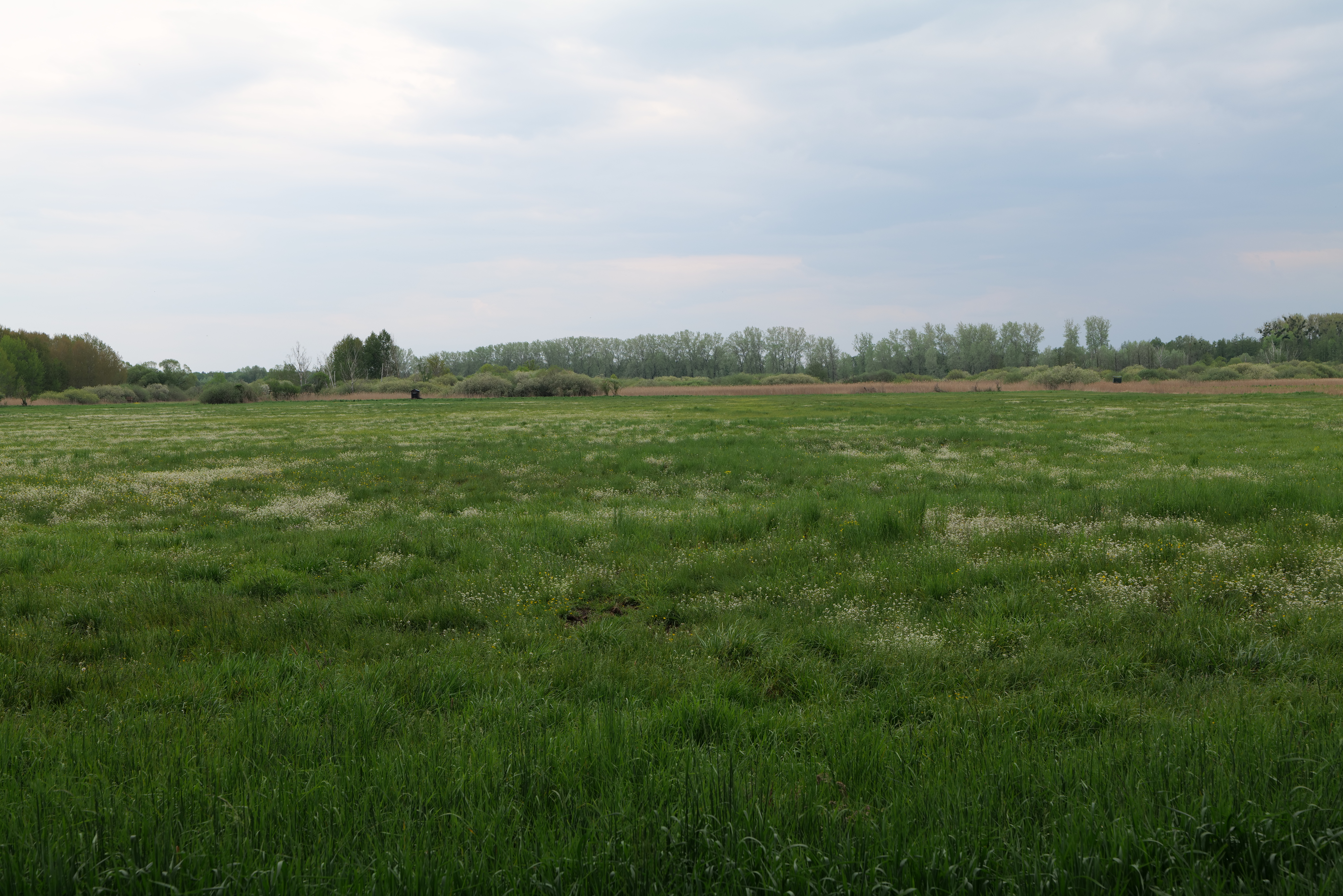 Kremmener Luch am 10. Mai 2020.